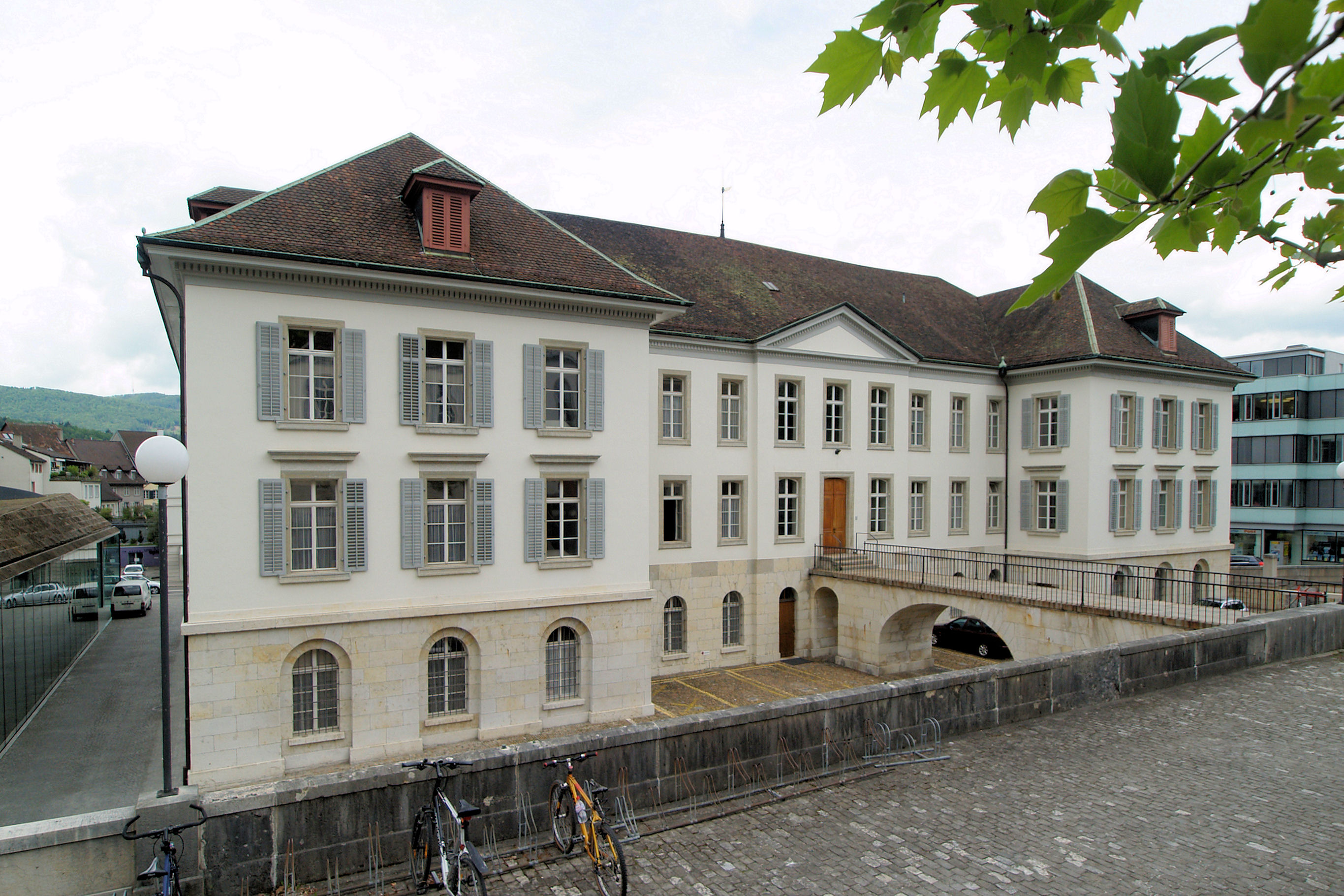 Das Regierungsgebäude des Kanton Aargau in Aarau. Süd-südwest Ansicht.